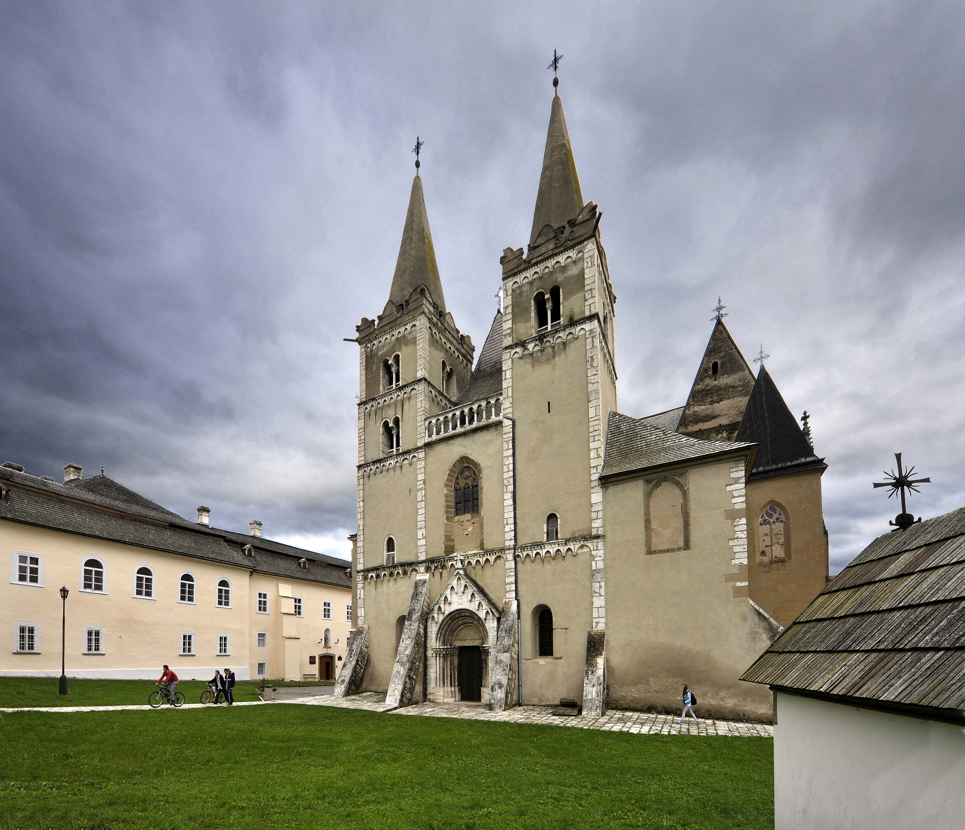 Kostol